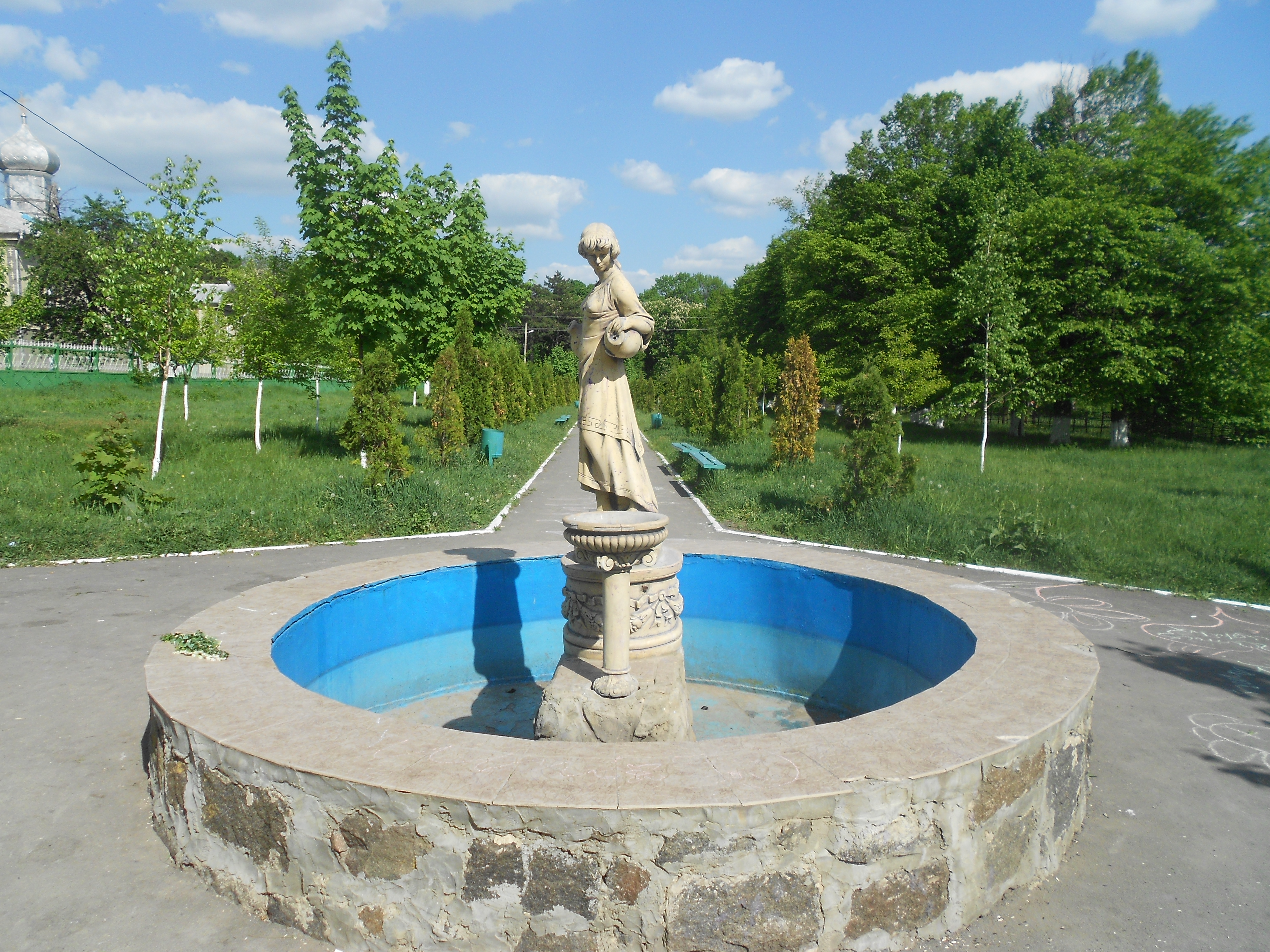 Parcul din Târnova, r. Dondușeni